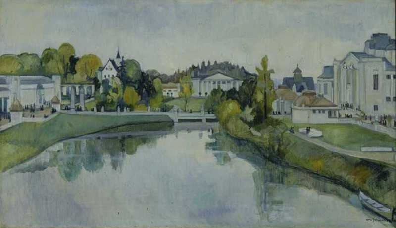 Fra jubileumsutstillingen i Frognerparken, arkitektur, parkanlegg, dam, Jubileumsutstillingen på Frogner.